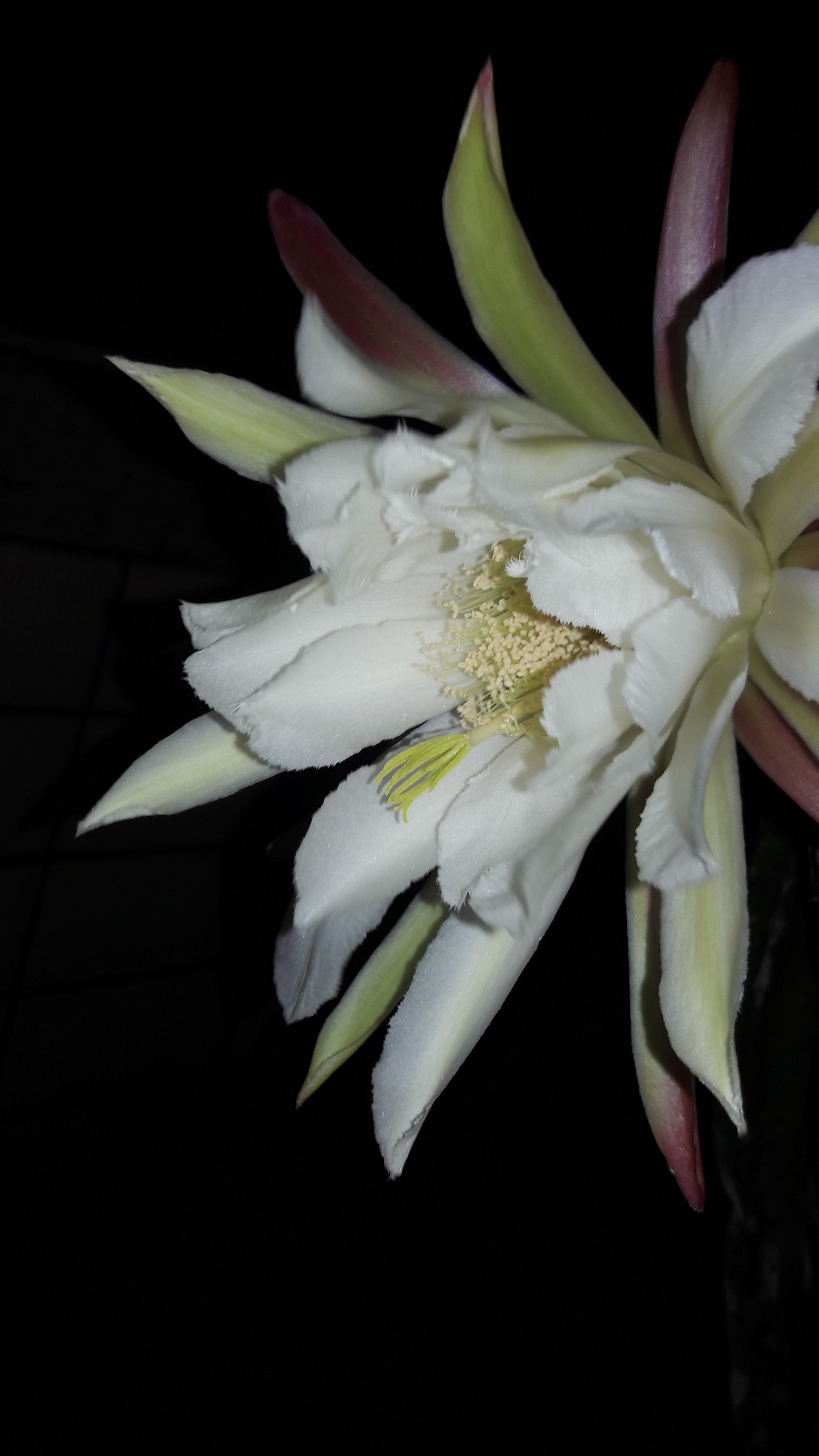 Flor do mandacaru